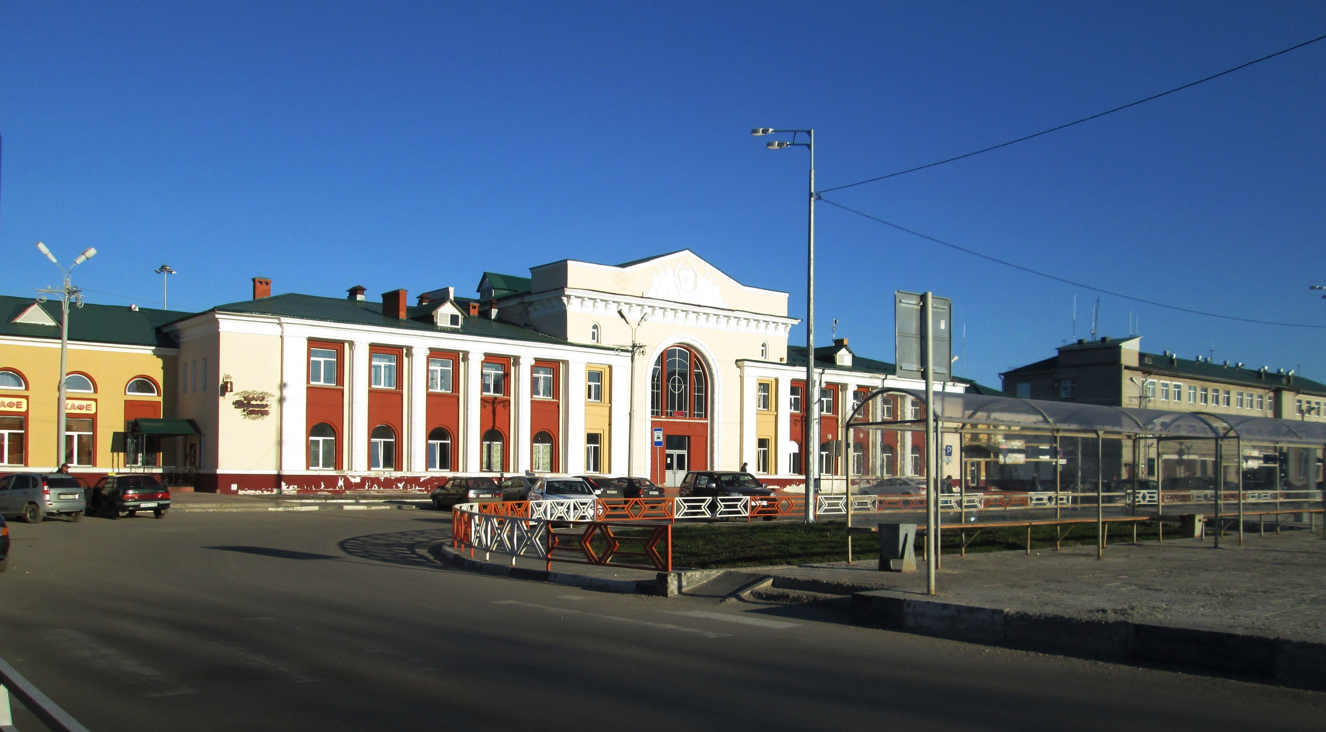 Станция Котлас-Южный